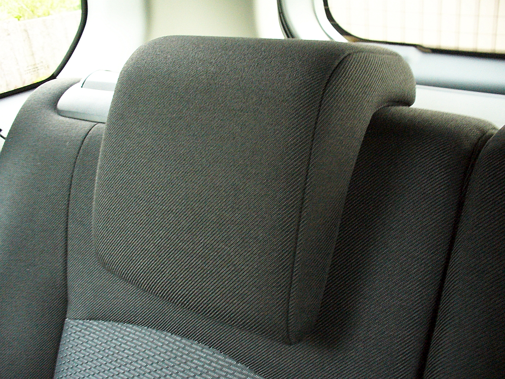 Kopfstütze Mazda2